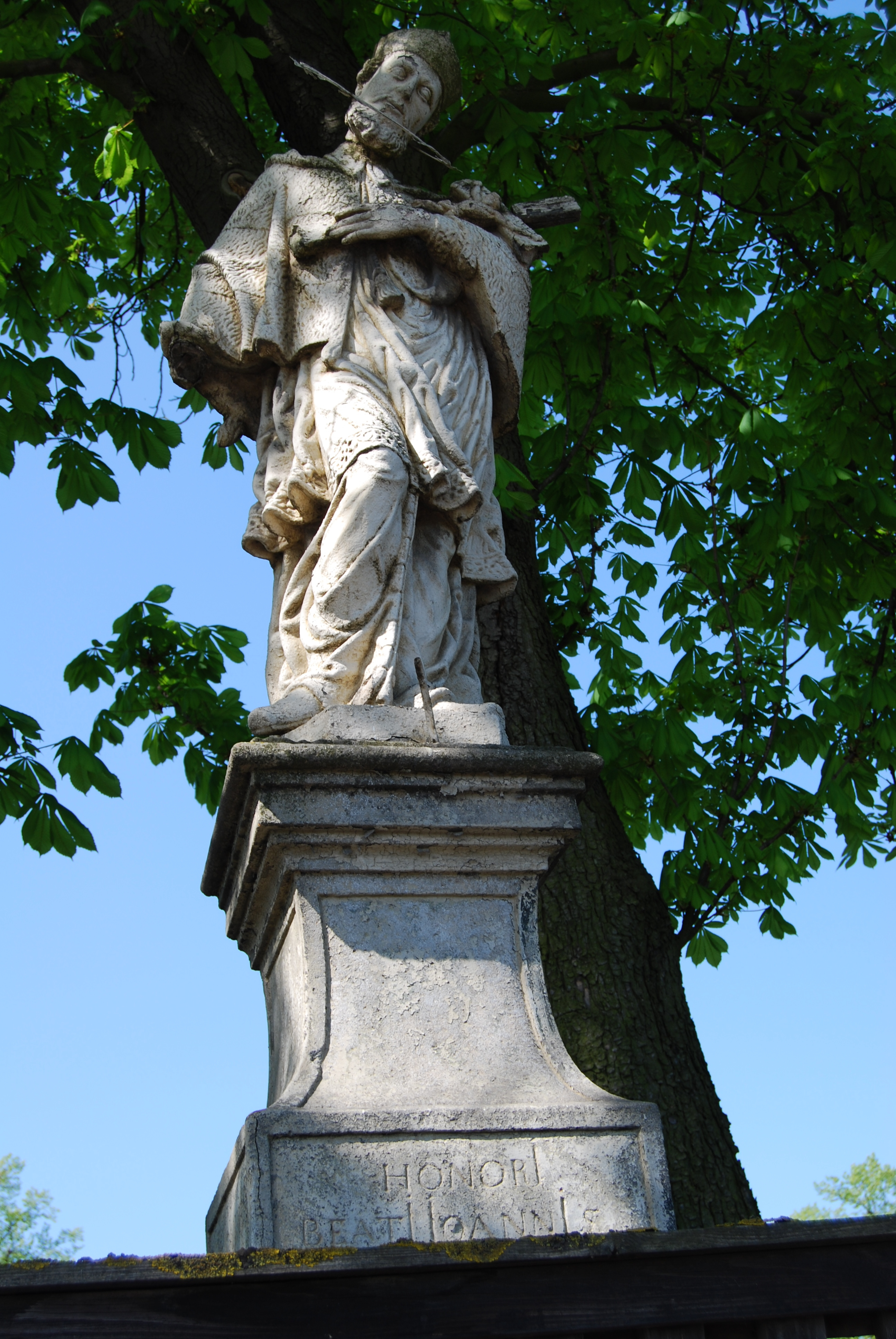 Barokowa figura św. Jana Nepomucena z 1772 roku.